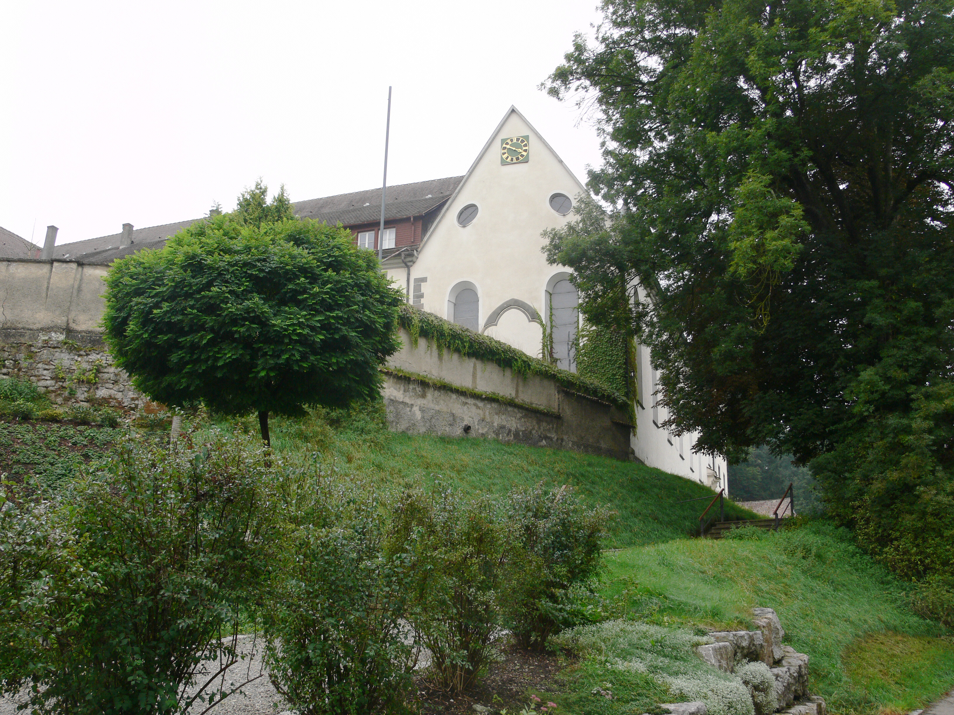 Kloster Habsthal, Gemeinde Ostrach, Landkreis Sigmaringen